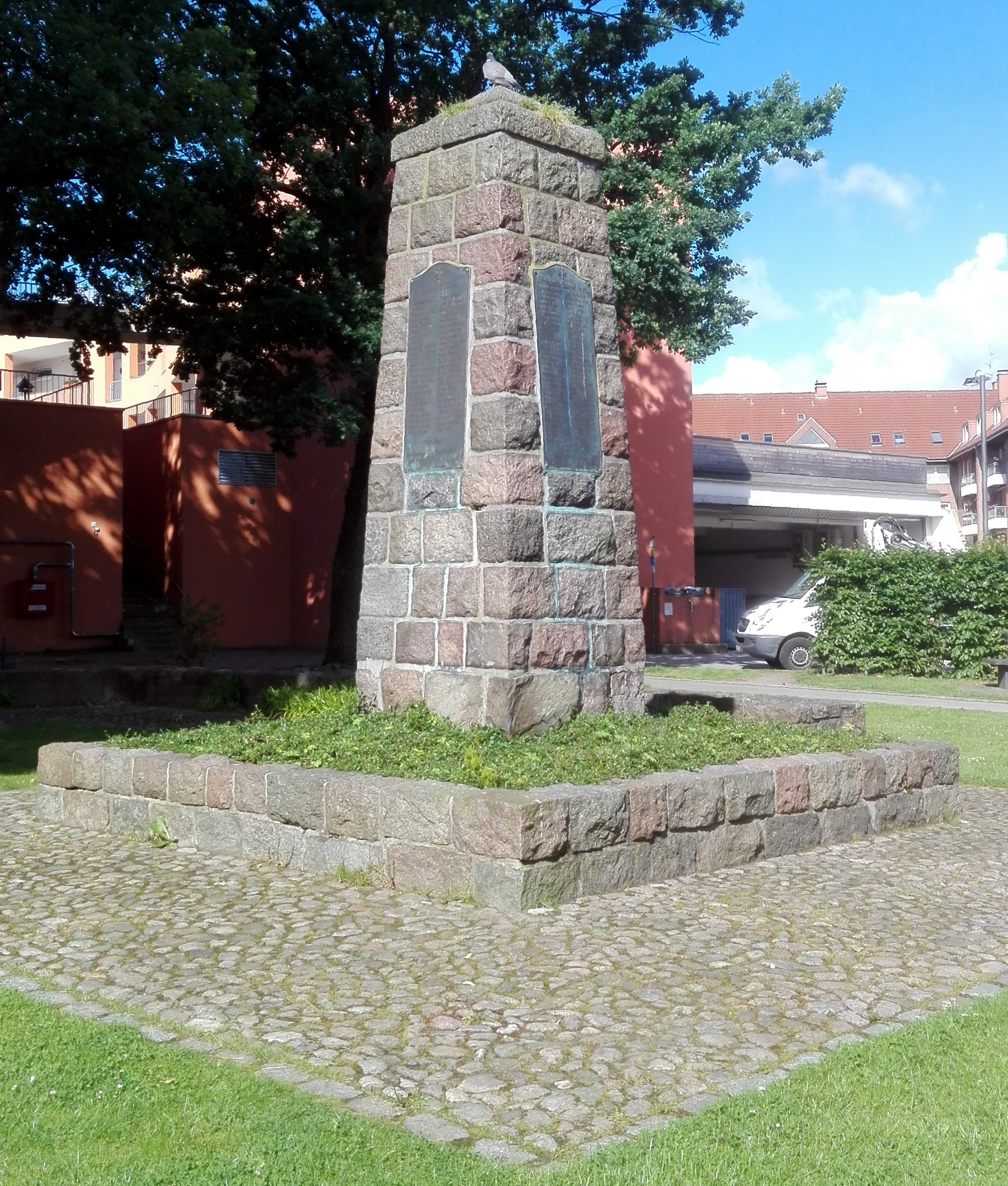 Nach dem Ersten Weltkrieg stellten die Stockelsdorfer bei ihrer Kirche ein Kriegerehrenmal auf. Die Gefallen sind auf diesem Ortsteilspezifisch aufgelistet.